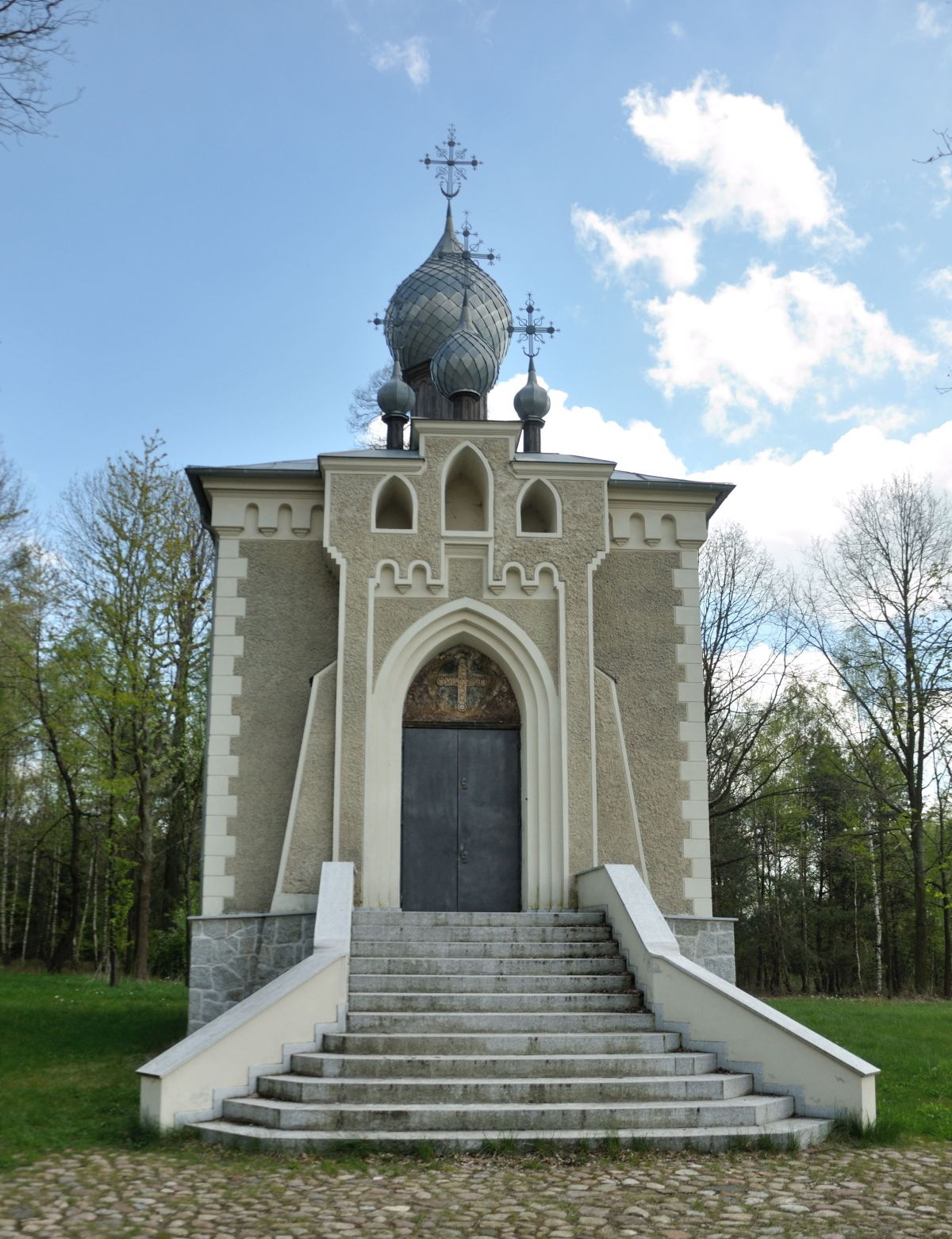 Cerkiew Chróscin-Zamek